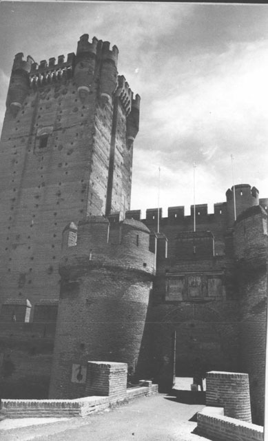 Castillo de la Mota - Medina del Campo (Valladolid) - Fotografía 80,50 x 140 B/N